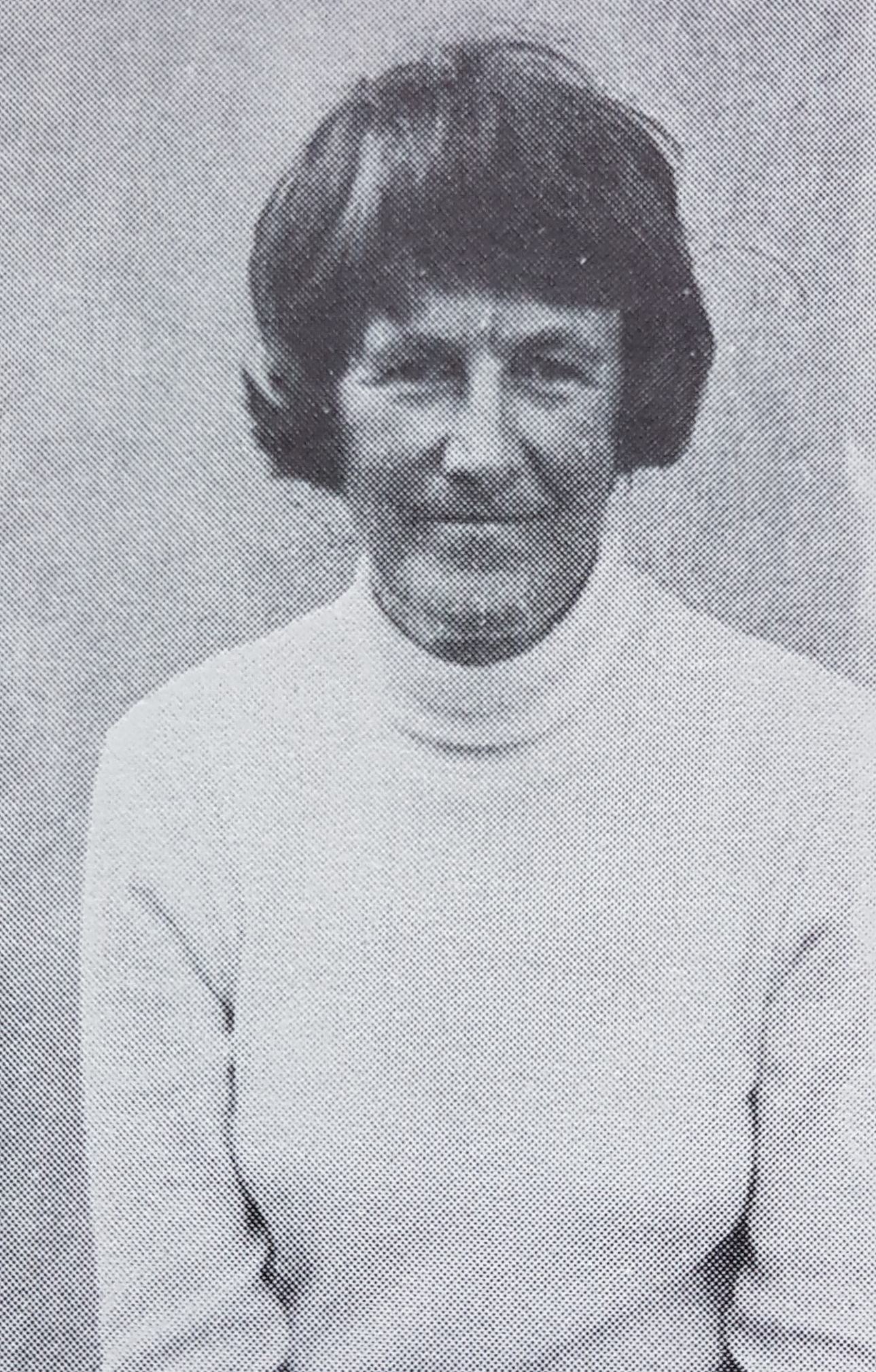 Peggy Nerman Artist from Sweden